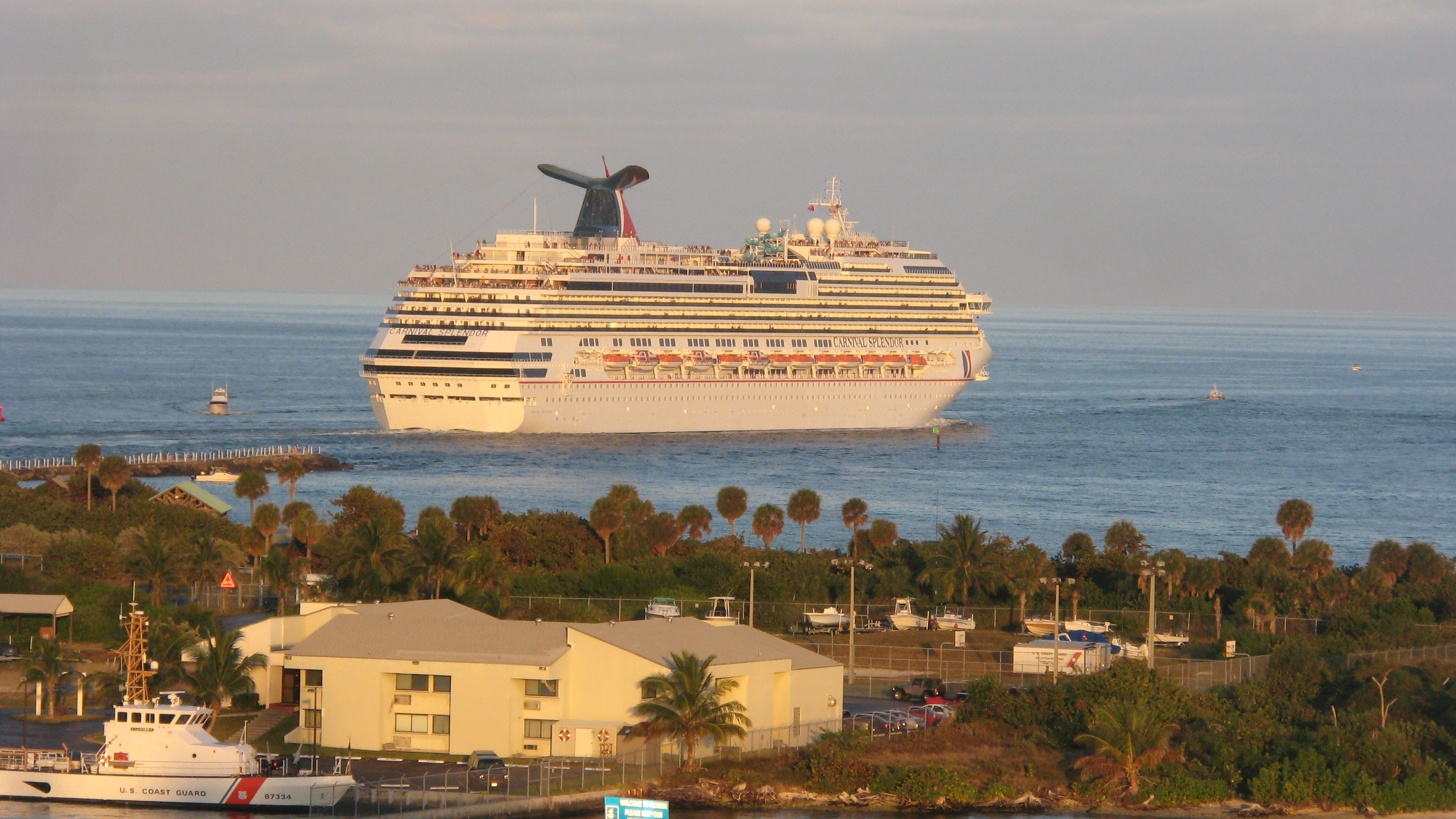 Le carnival Splendor au depart de port everglade